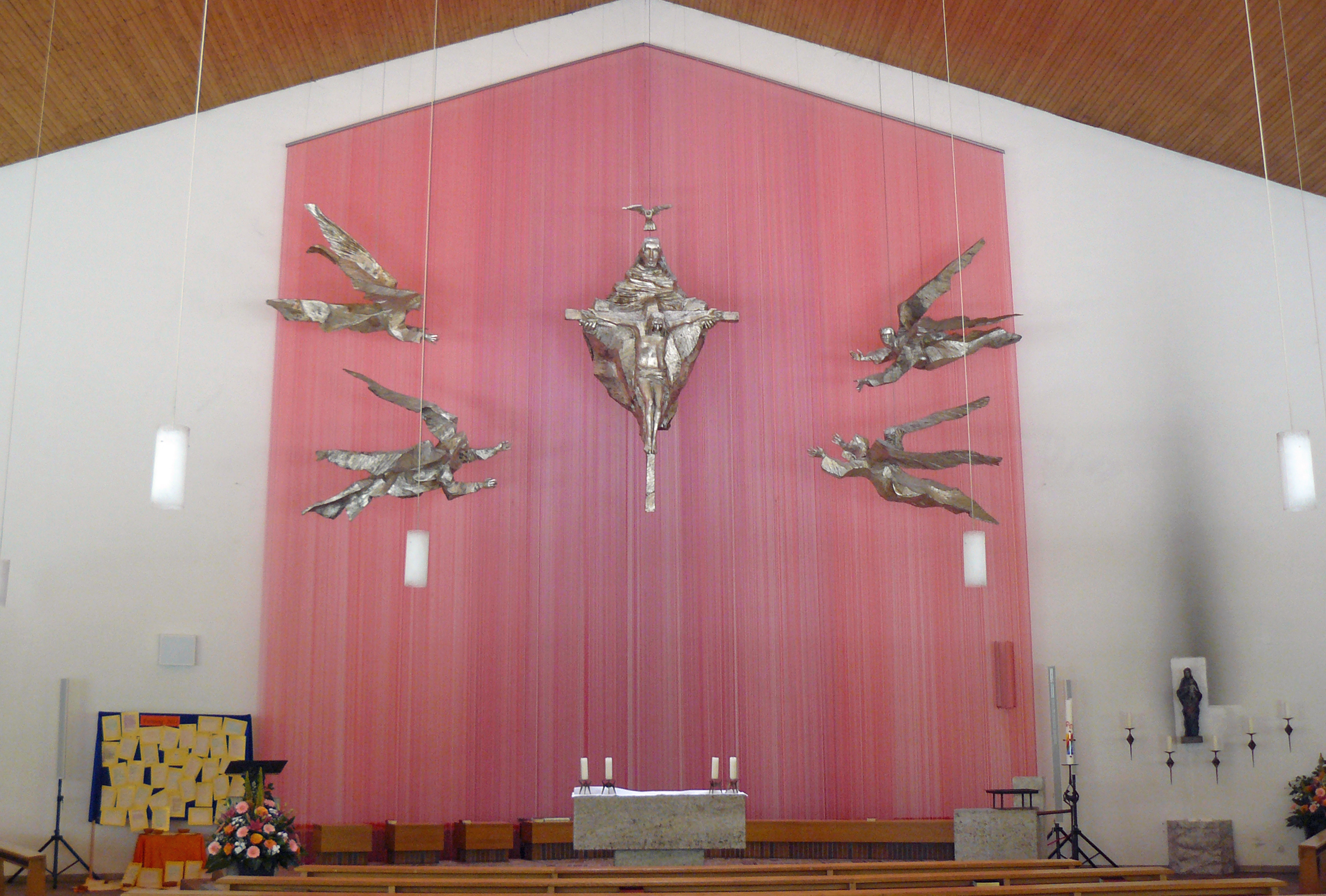 Innenansicht der Pfarrkirche zu den Hl.Engeln in Geltendorf/ Bayern